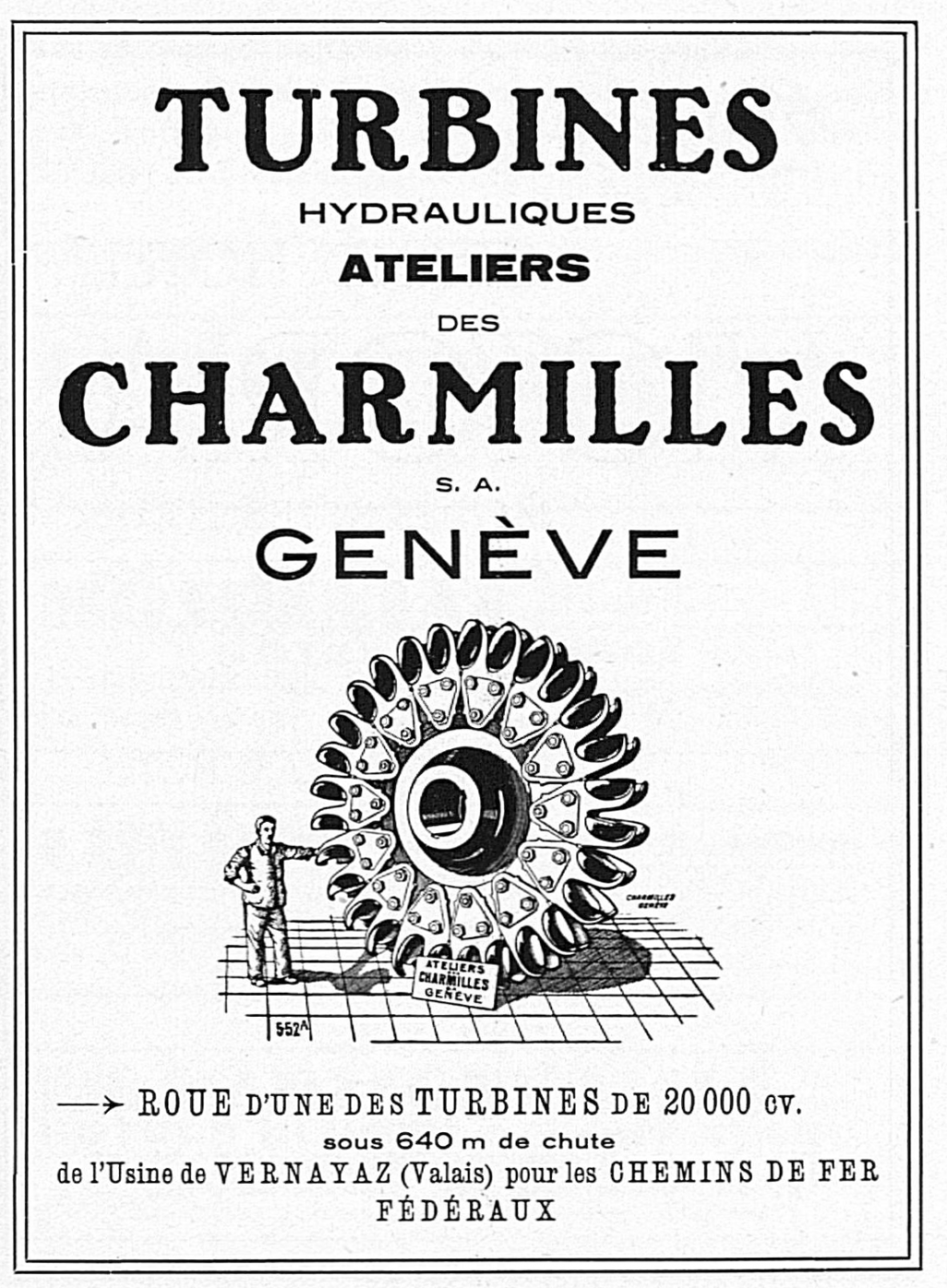 Inserat der Ateliers des Charmilles S. A., Geneve mit Petron-Turbinen-Rad für das SBB Kraftwerk Vernayaz